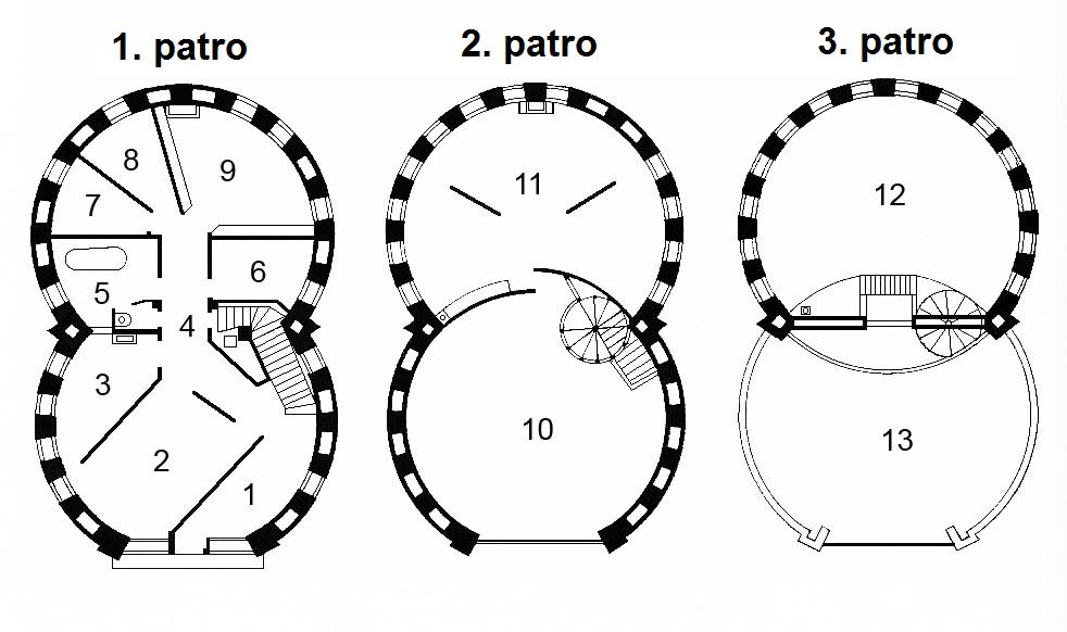 Plán domu architekta Melnikova s českými popisky pater